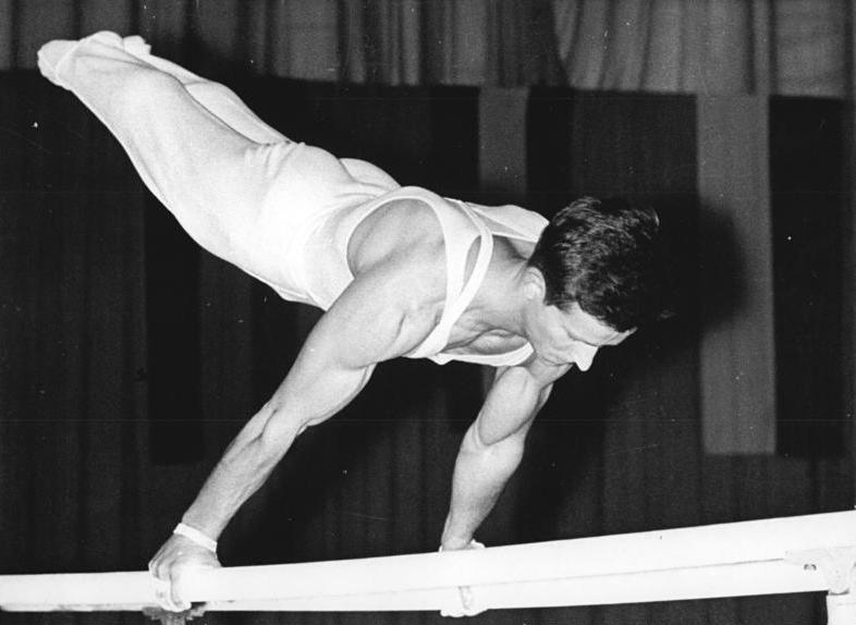 Siegfried Fülle Zentralbild Studré 21.11.1965 Belgrad: DDR-Turner führen gegen Jugoslawien. Siegfried Fülle (DDR) am Barren. Er wurde bester Einzelturner nach dem ersten Wettkampftag (56,25 Punkte). Mit 279,65 zu 275,65 Punkten führte die DDR nach den Kürübungen im Turn-Länderkampf gegen Jugoslawien in Belgrad am 20.11.1965. (Archivfoto)